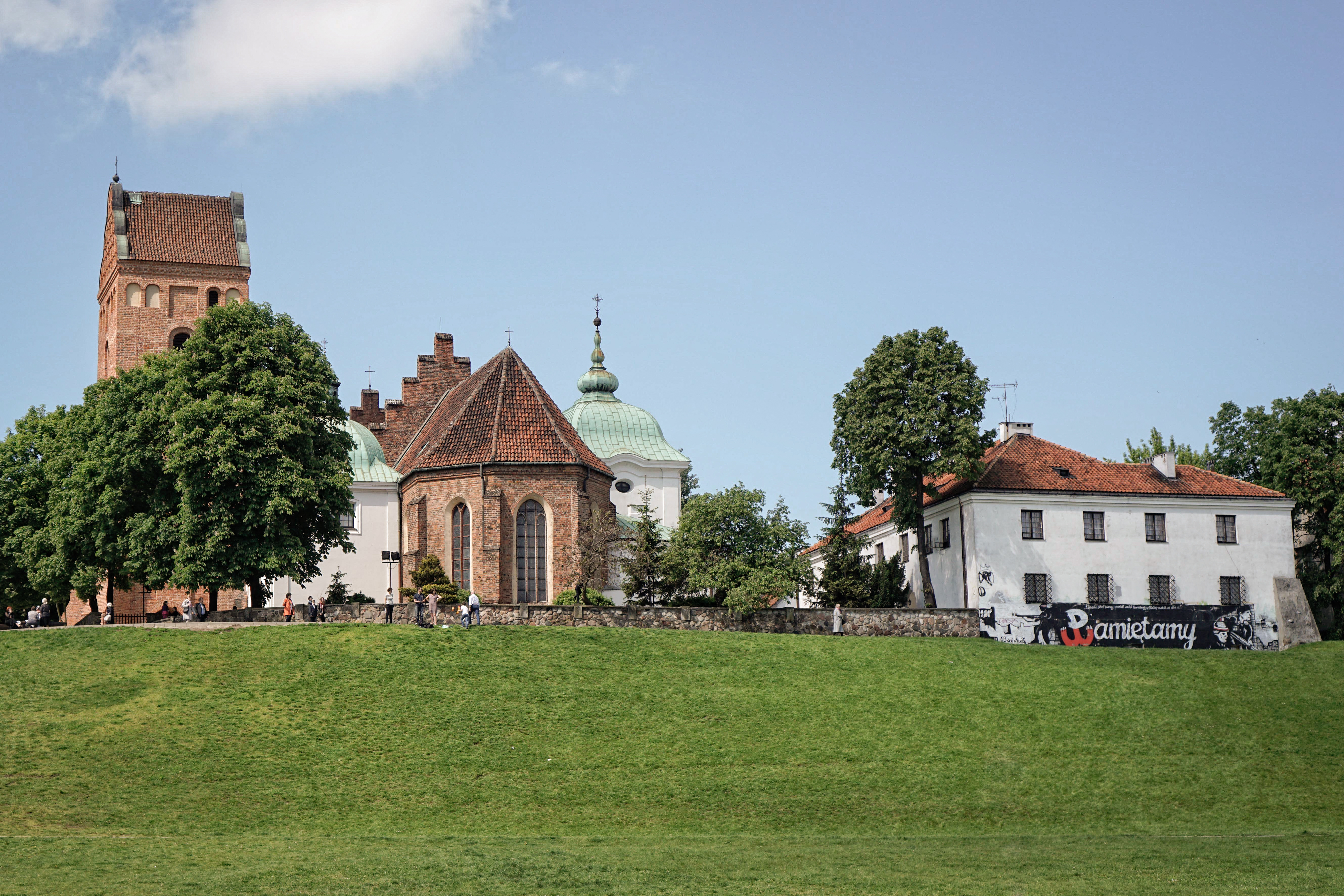 Kościół Nawiedzenia Najświętszej Maryi Panny w Warszawie, widok od strony Wisły